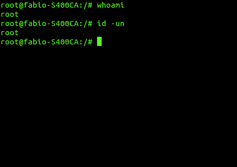 Whoami & id -un unix